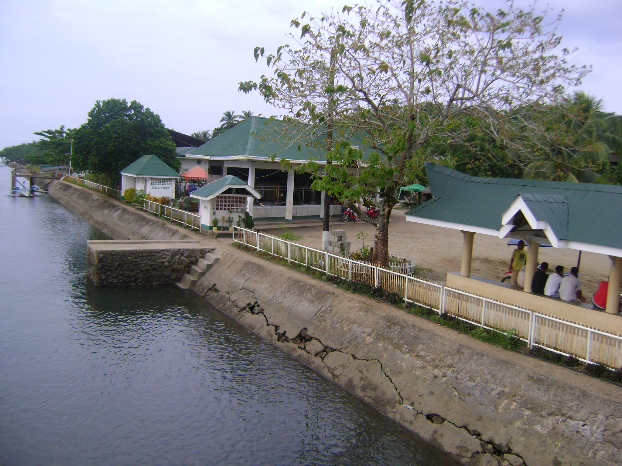 seawall of Bayabas, Surigao del Sur